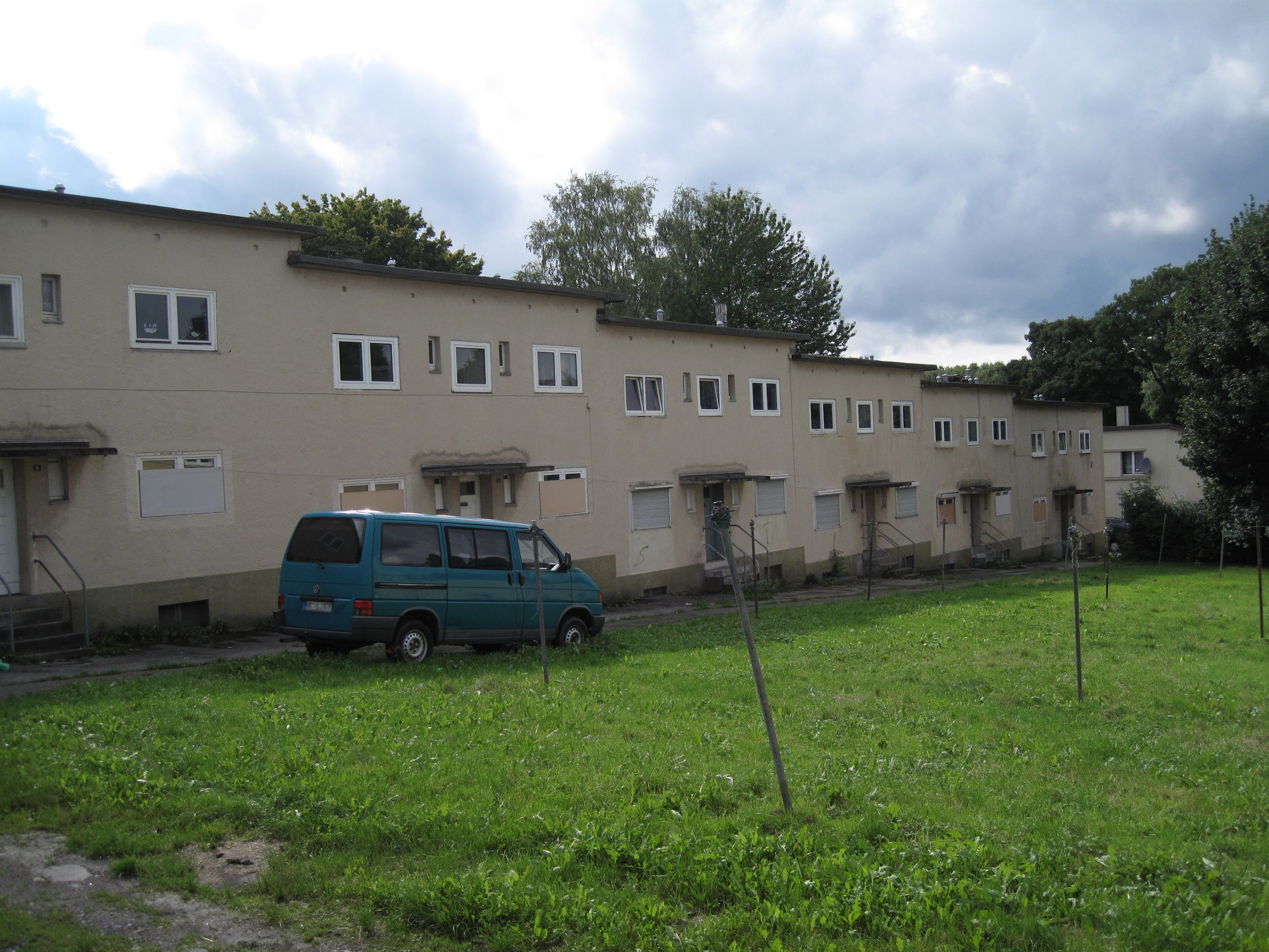 Schlieperblock (Frontansicht der Gebäude Drosselweg 1-6) in Iserlohn. This image shows a heritage building in Germany, located in the North Rhine-Westphalian city Iserlohn (no. 230).